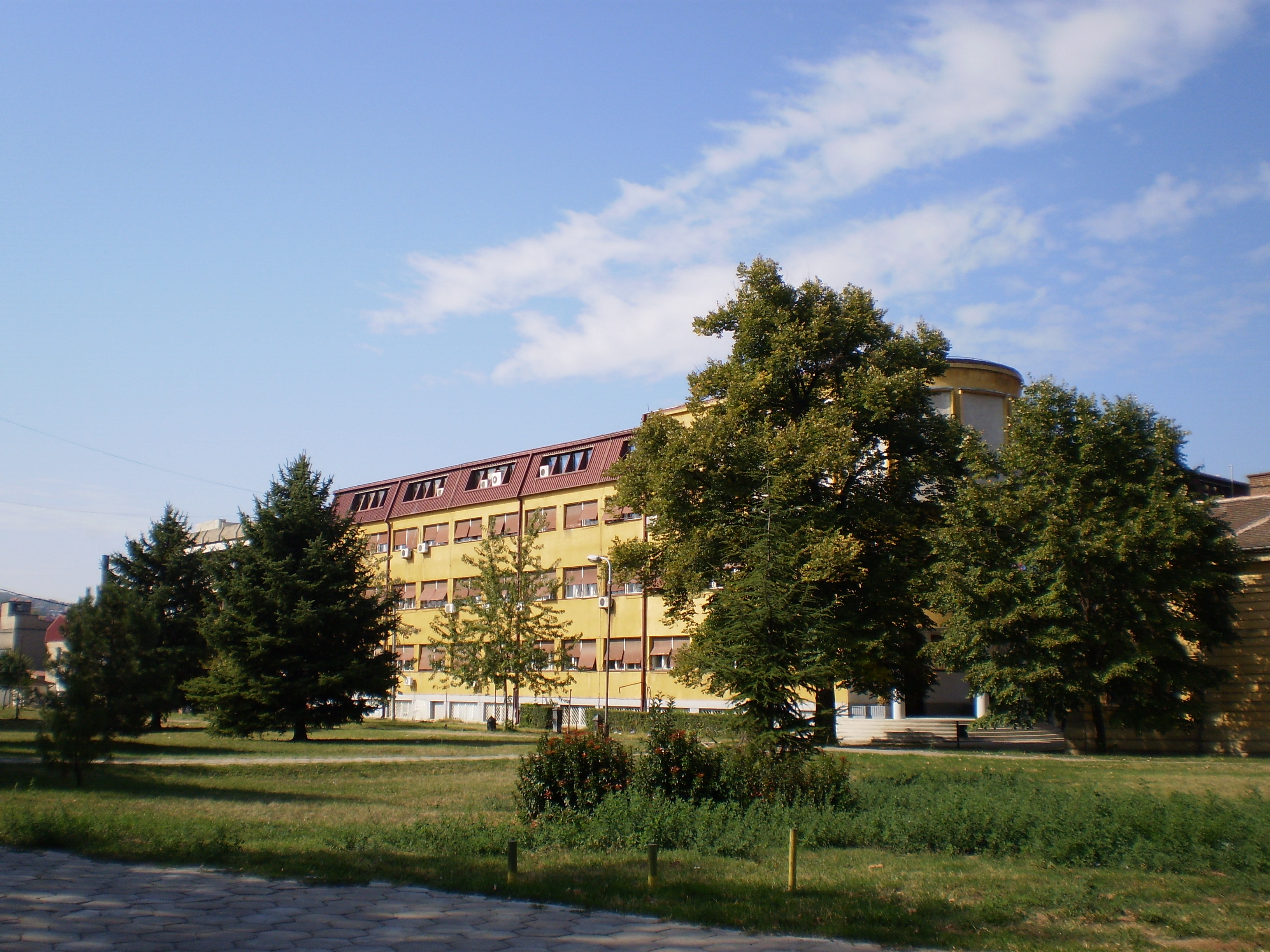 Institut za javno zdravlje Niš. Autor dr Milorad Dimić, Niš, 2. oktobar 2011.